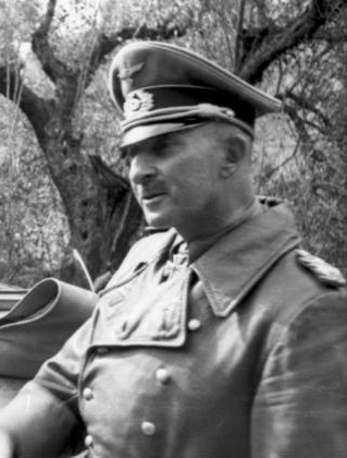 Title: Generaloberst von Arnim und General von Vaerst Extra information: Nordafrika, Rades bei Tunis.- Generaloberst Hans-Jürgen von Arnim begrüßt General Gustav von Vaerst; PK "Afrika" People in the image: Arnim, Hans Jürgen von: Generaloberst, Ritterkreuz (RK), Heer, Deutschland (GND 133539407) * Vaerst, Gustav von: General der Panzertruppe, Ritterkreuz, Heer, Deutschland (GND 117325023) Factual corrections and alternative descriptions are encouraged separately from the original description. Additionally errors can be reported at this page to inform the Bundesarchiv. Original historic description